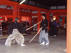 Kata de bokken, type koryu, à Itsukushima Jinja